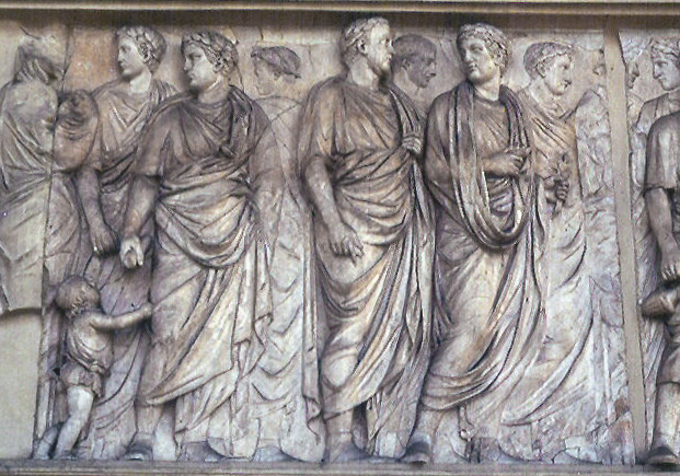 Foto personale